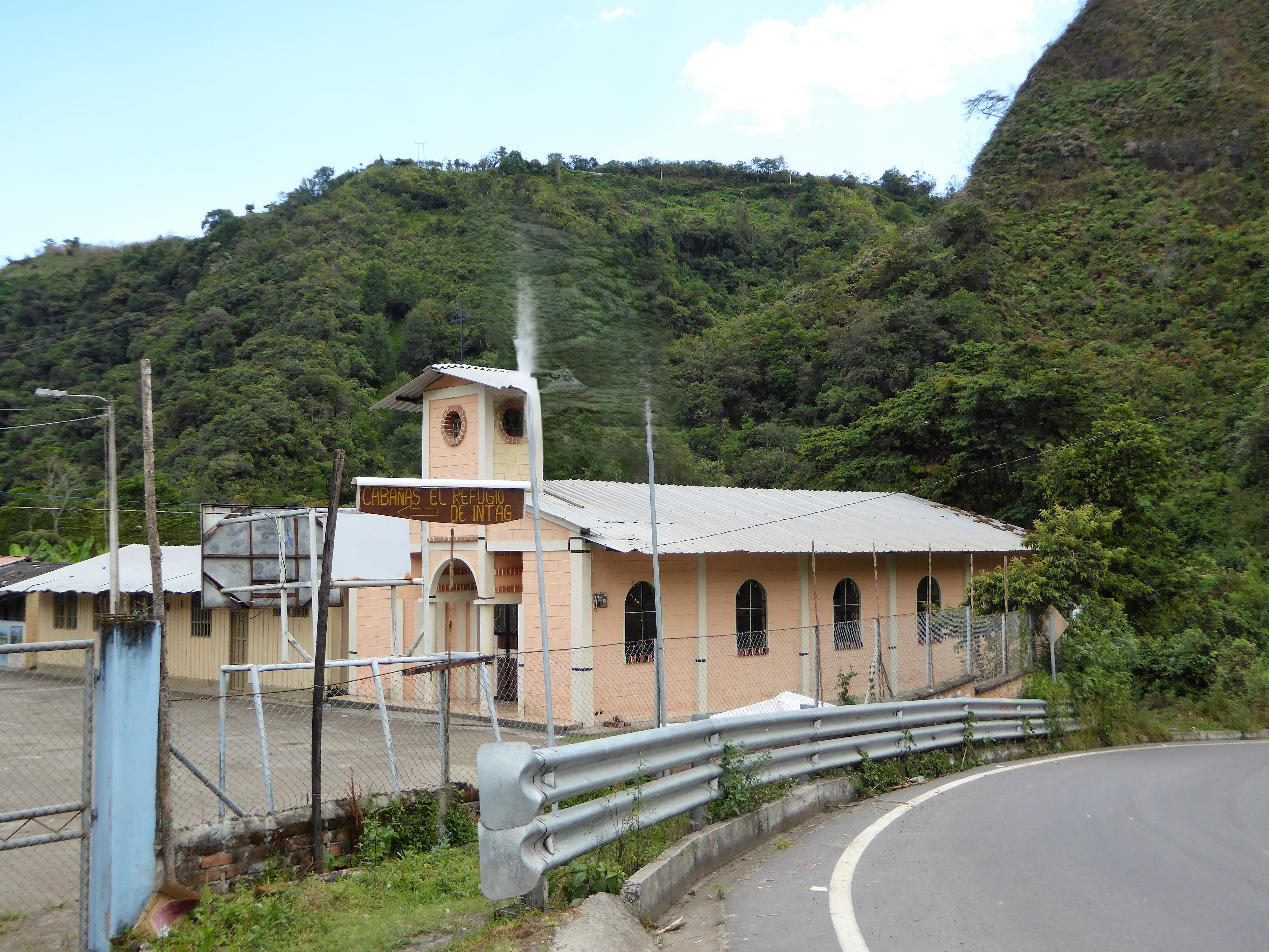 Kirche im Valle Intag